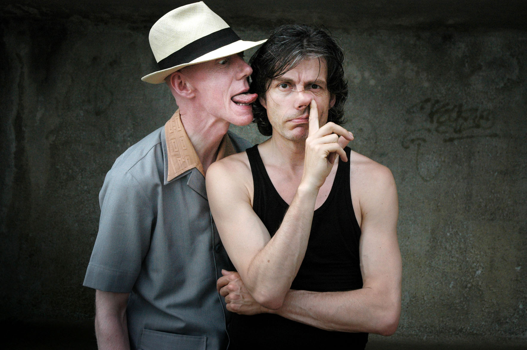 Kamagurka en Herr Seele (met hoed), hier in de buurt van Beaune (Côte-d'Or) tijdens de opnames van het Canvas-programma 'Het Bourgondisch Complot'.